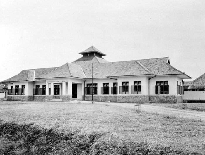 Repronegatief. Frontaanzicht van het ziekenhuis te Djatiroto, Oost-Java